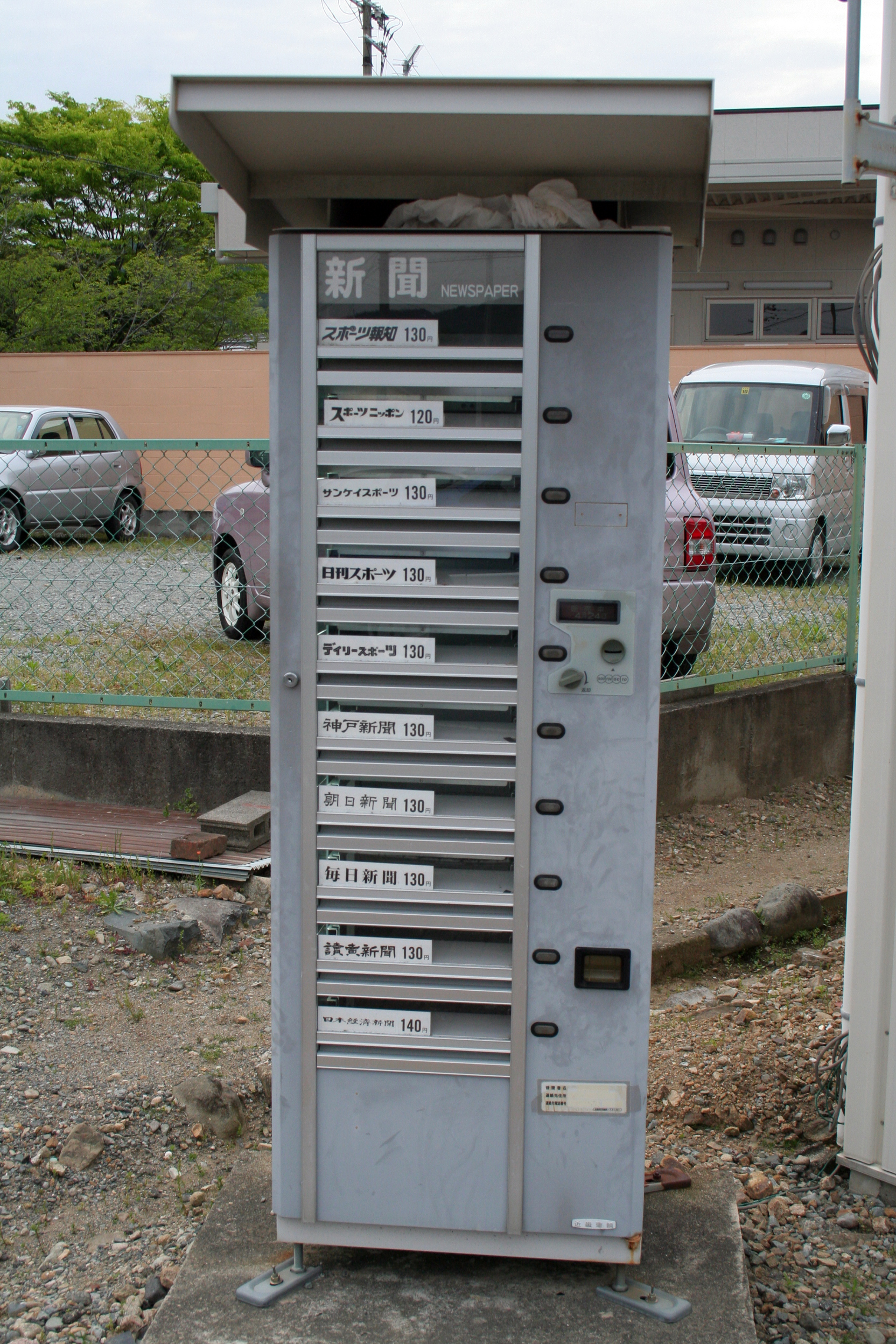 日本にある自動販売機などの機械。 新聞の自動販売機。